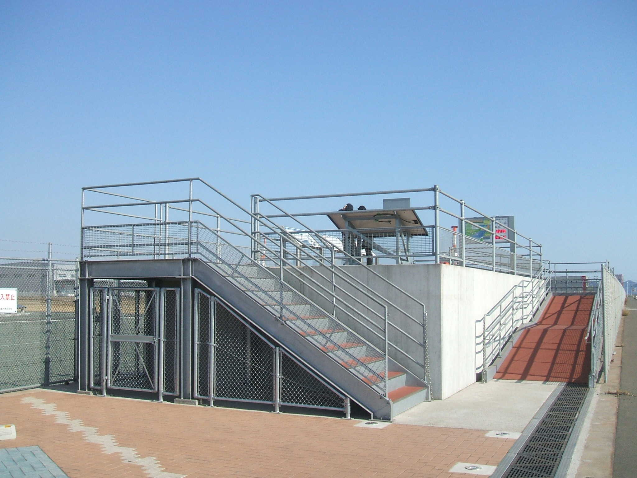 広島県福山市箕沖町にある中国電力福山太陽光発電所の見学者用展望デッキ